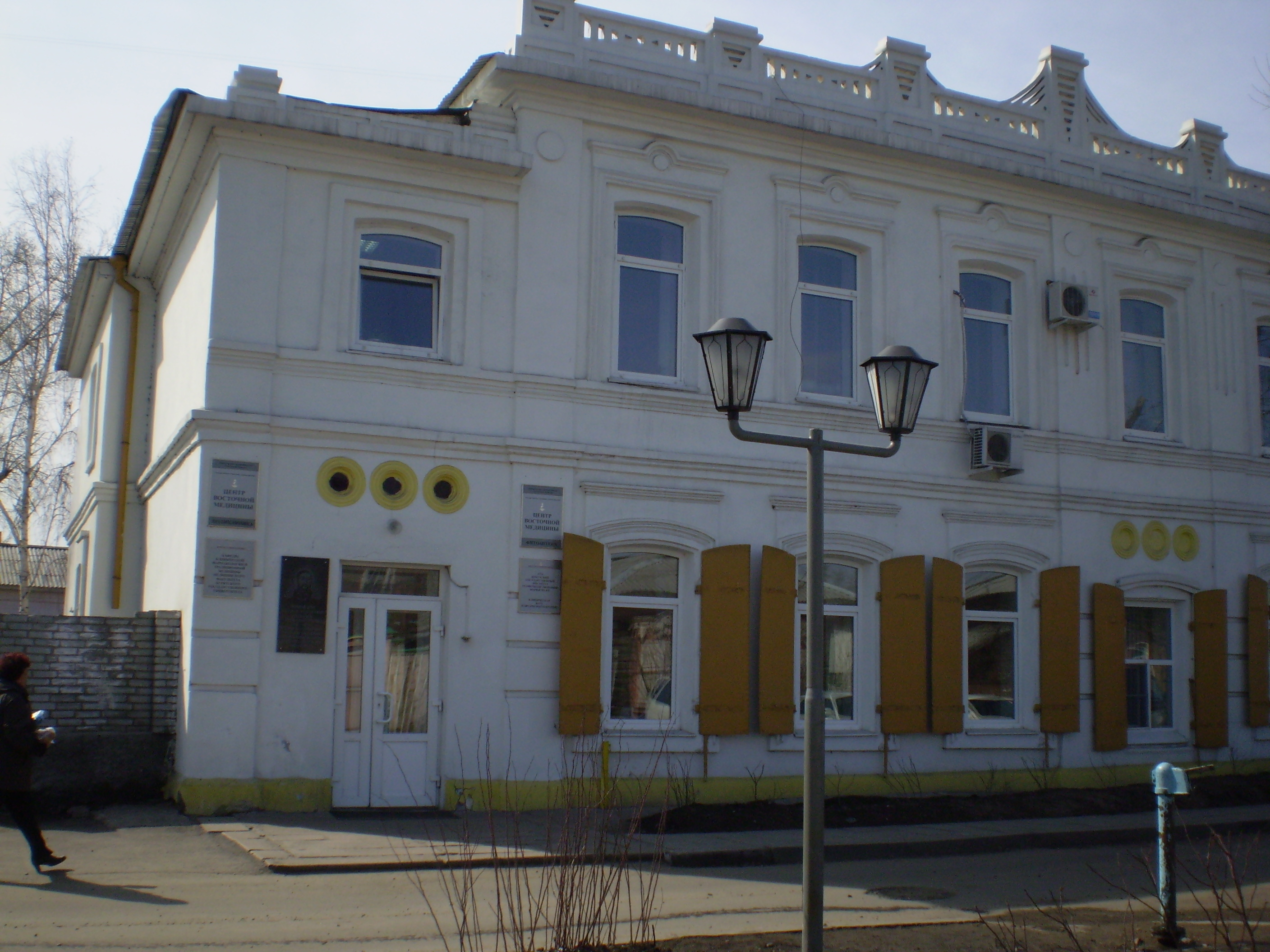 Центр Восточной медицины в Улан-Удэ